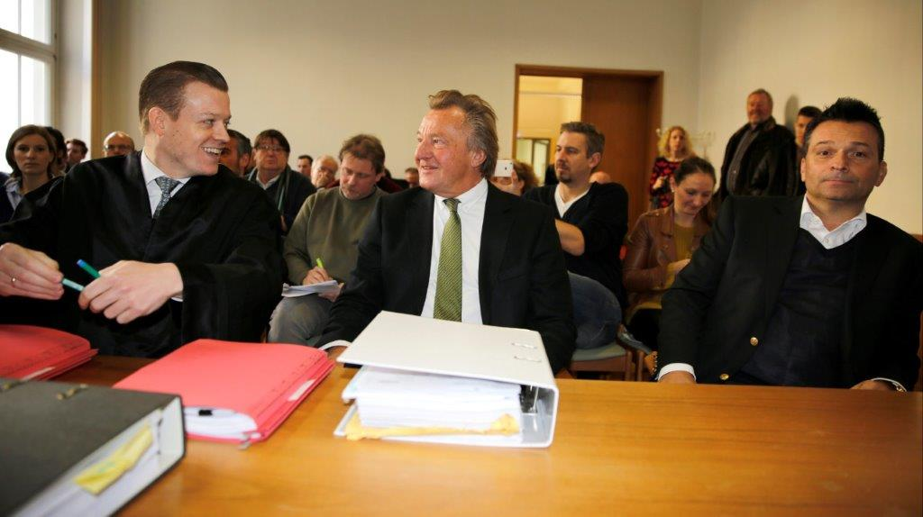 Von links nach rechts: J.-M. Menke, H. Strutz, C. Heidel, 17. Februar 2016, Mainz